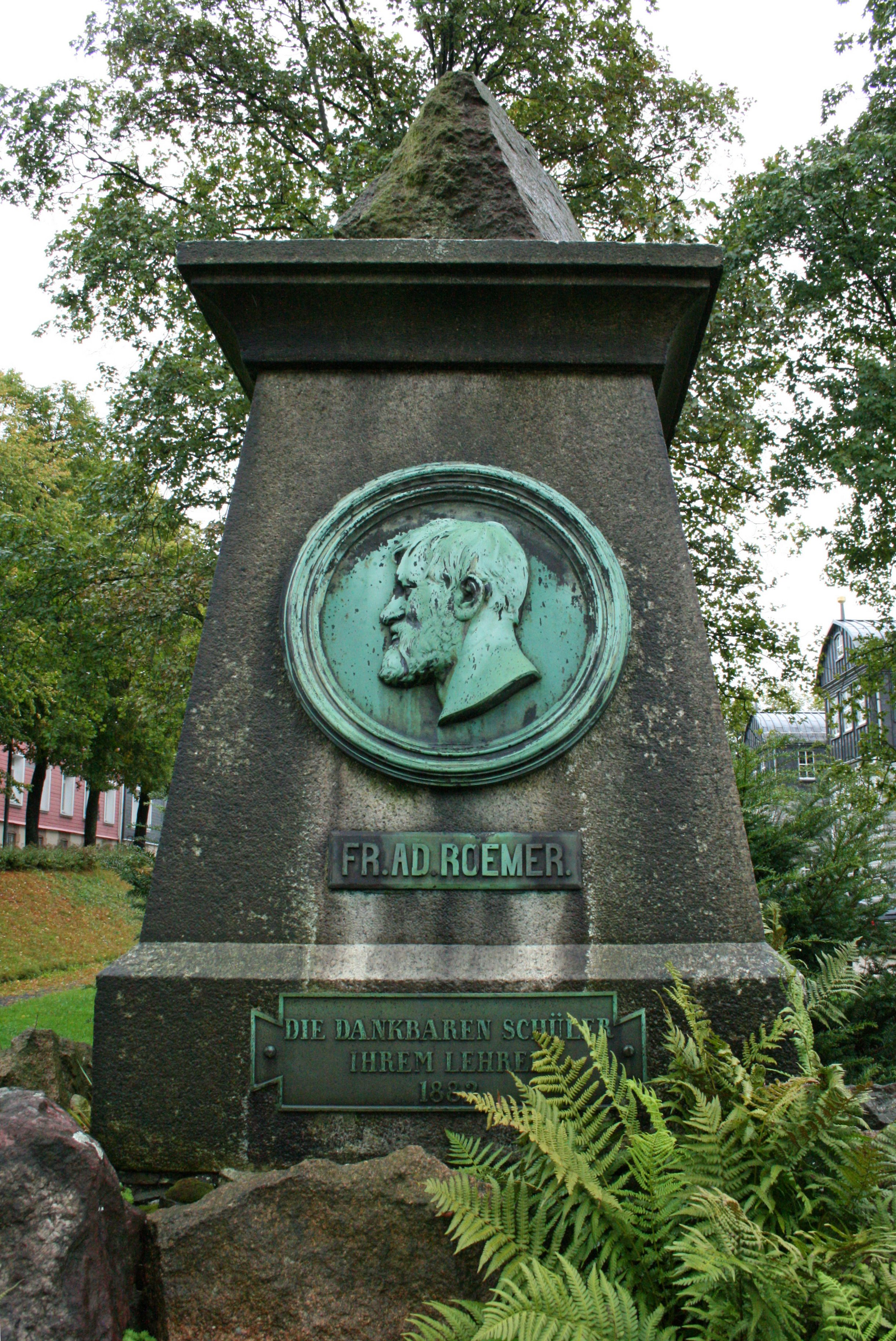 Denkmal Friedrich Adolph Romer